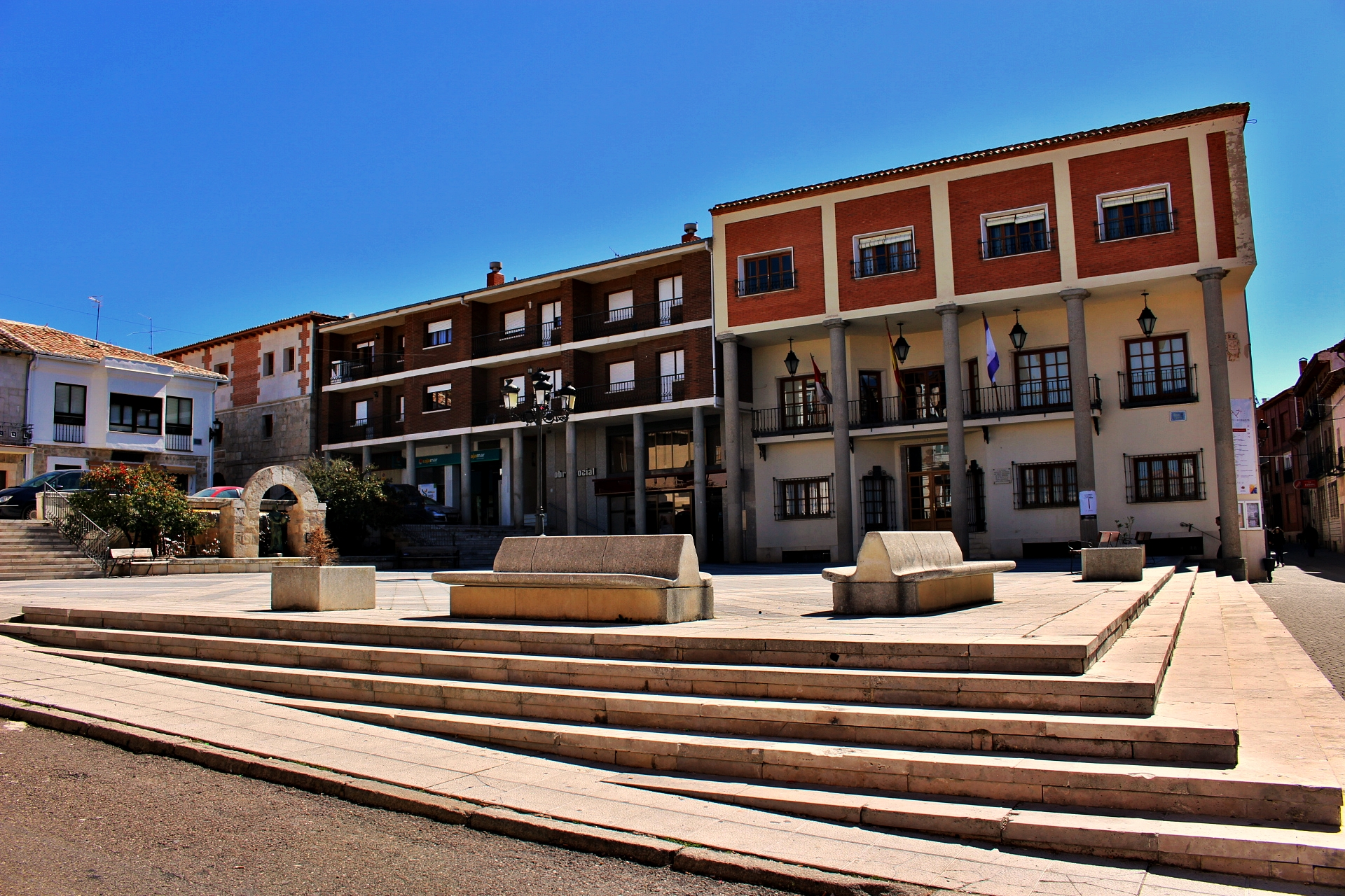 Plaza España Baltanás